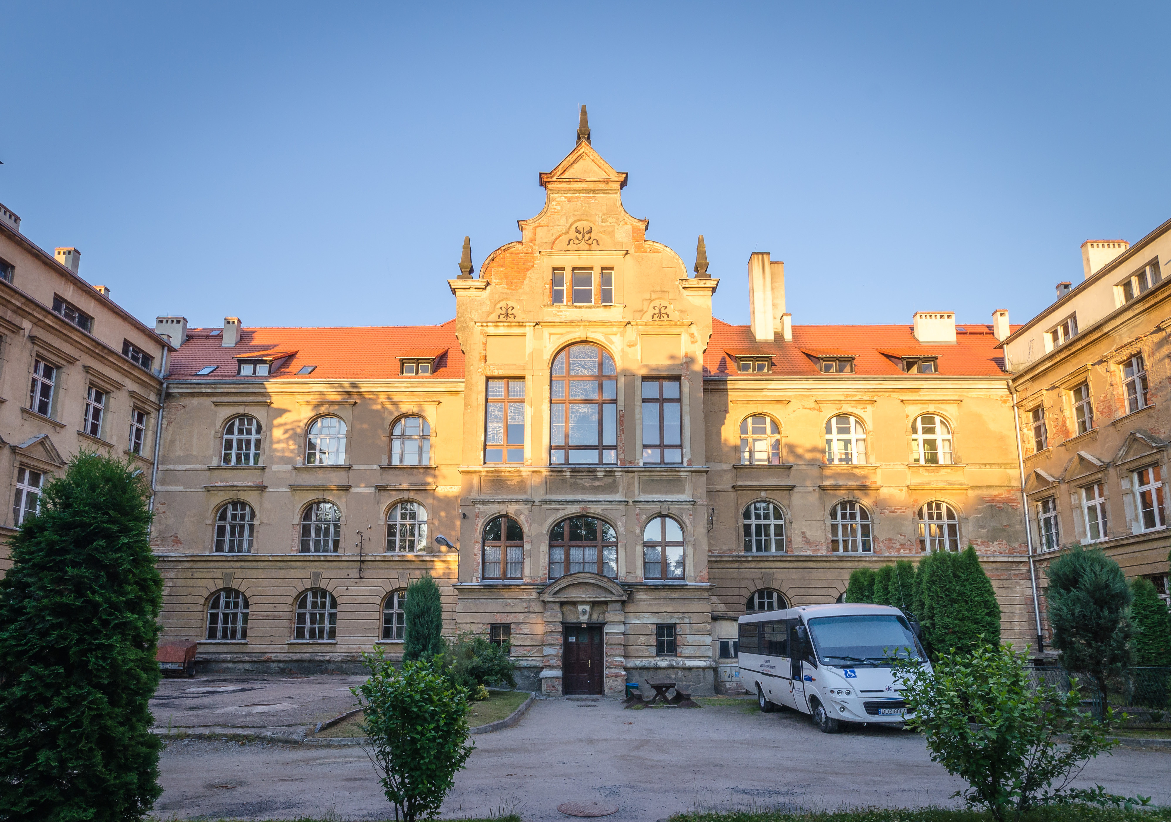 Piława Górna, gimnazjum, ob. ośrodek szkolno-wychowawczy, 1894-1896 This photo of Lower Silesian Voivodeship was taken during Wikiexpedition 2013 set up by Wikimedia Polska Association.You can see all photographs in category Wikiekspedycja 2013.